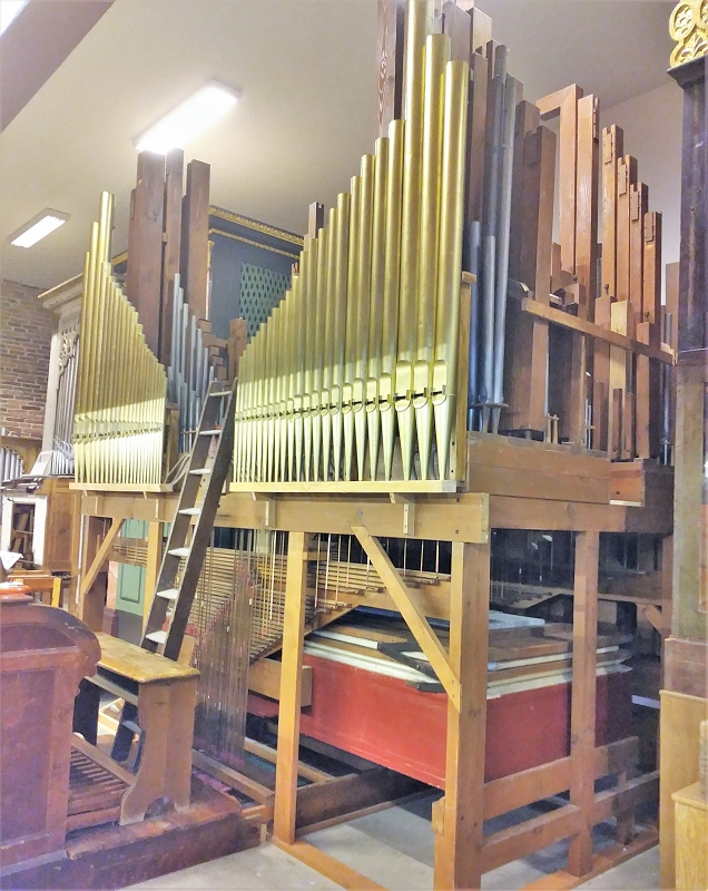 Orgel- und Spieltischsammlung im Untergeschoss der Zollingerhalle (Orgelzentrum Valley)